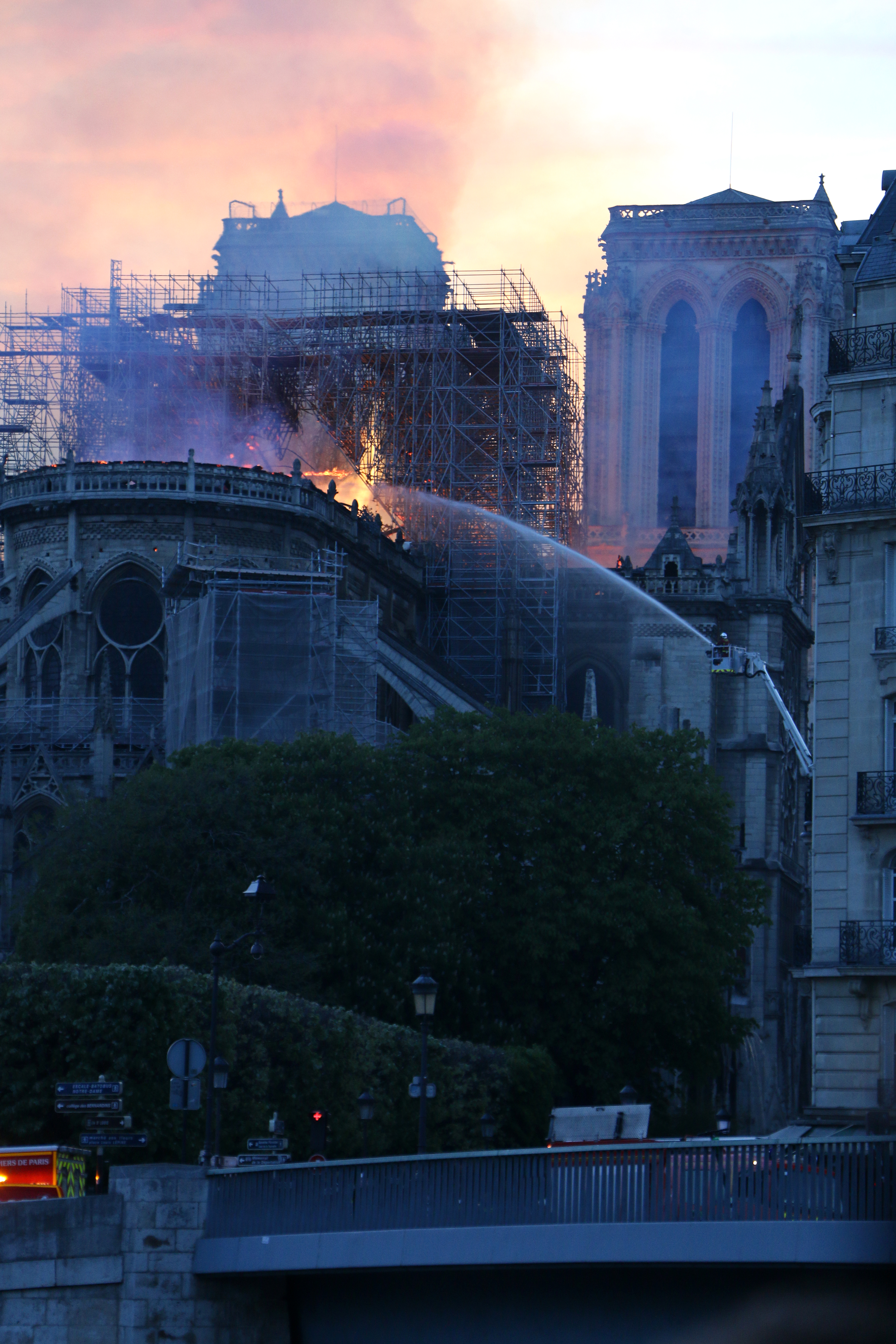 Incendie de la cathédrale notre dame de Paris (avril 2019) vu de l'île saint-Louis